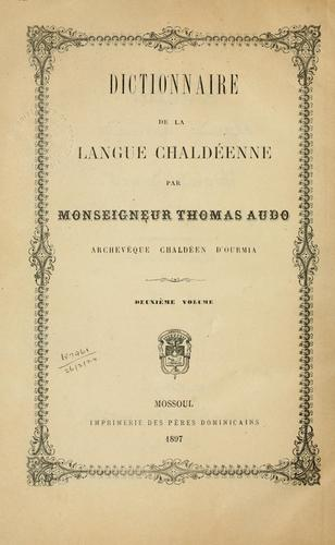 Thomas Audo chaldäisch-katholischer Bischof, Wörterbuch chaldäisch